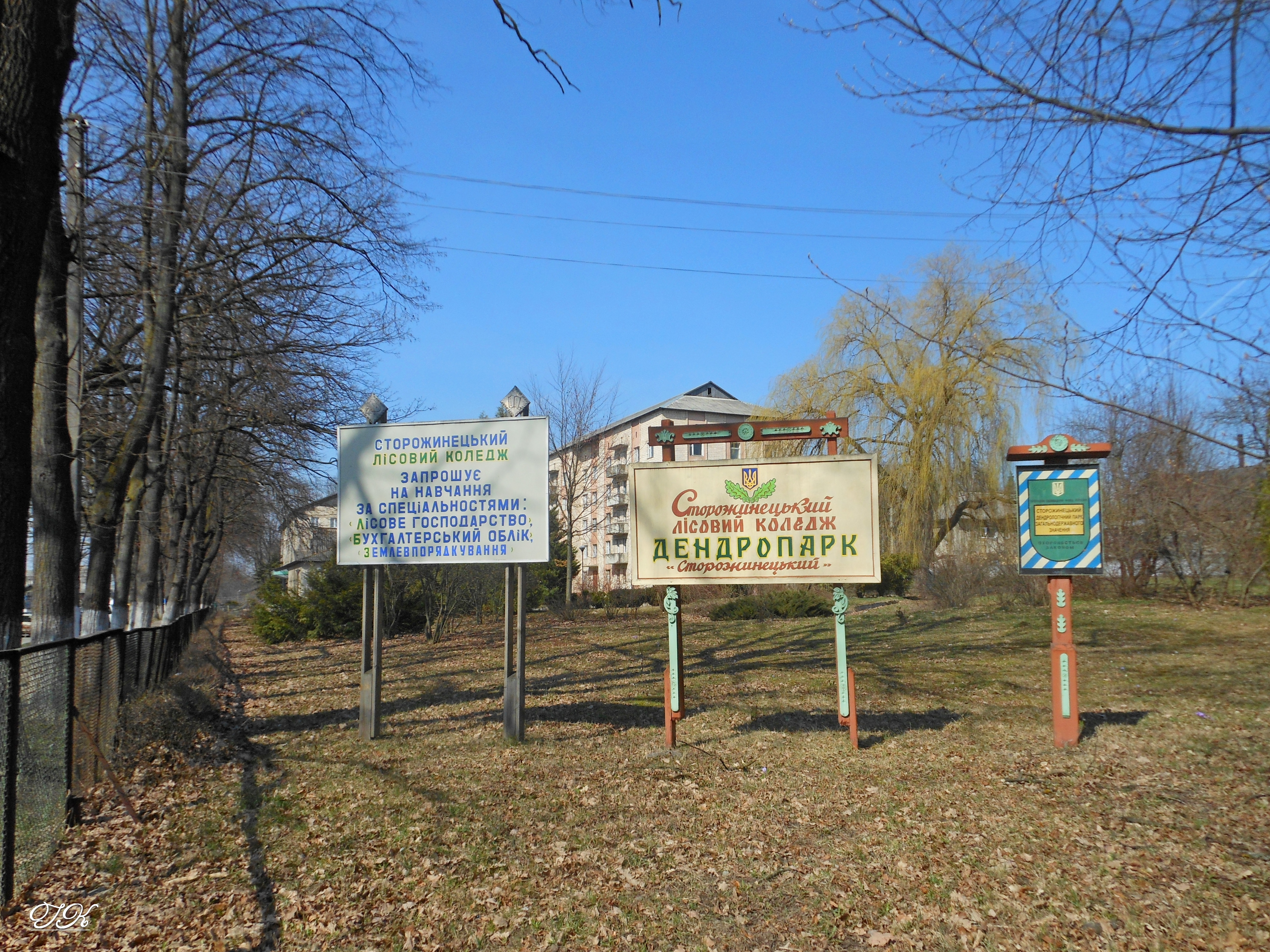 Сторожинецький, Сторожинецький район, м. Сторожинець